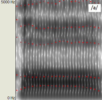 Madala tagavokaali /a/ spektrogramm (naiskeelejuht)